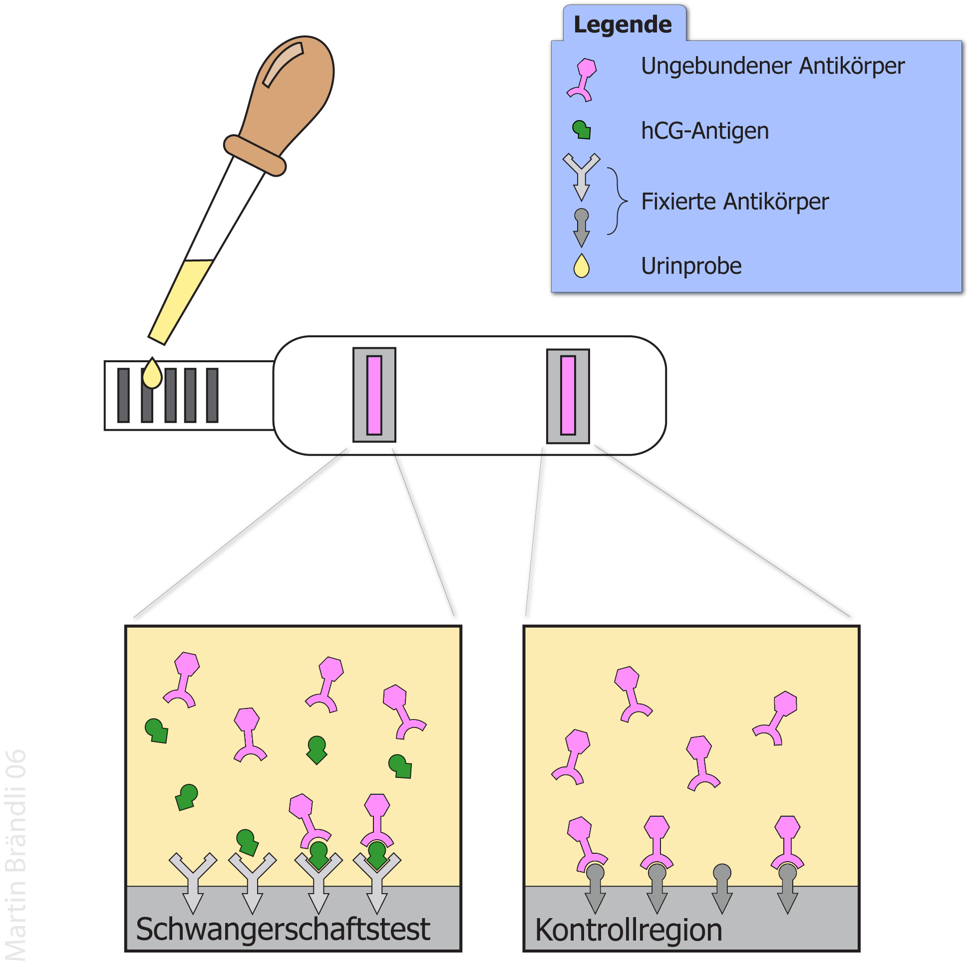 Schematische Darstellung der Funktionsweise eines Schwangerschaftstests